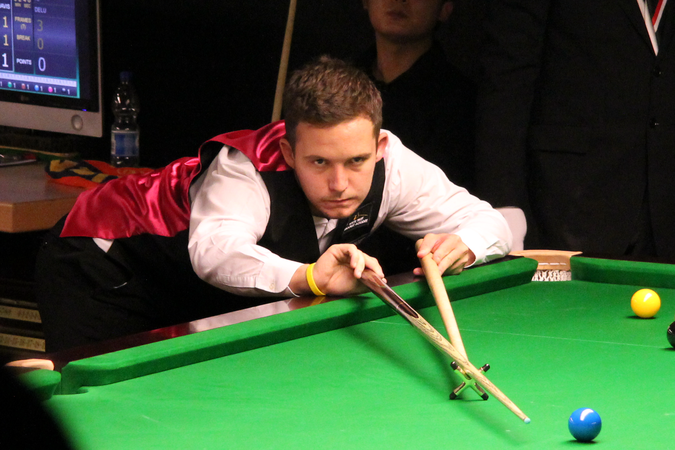 Jamie Jones beim Paul Hunter Classic 2011